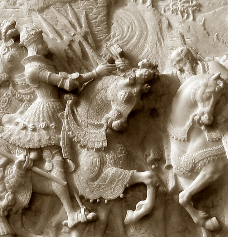 Detail des Bildreliefs zu Inschrift Nr.8: "... unusque procerum Gallicorum qui ... Maximiliano... duas claves consignet." - Überreichung von zwei Schlüsseln an Maximilian als symbolischer Akt der Rückgabe von Freiburgund und Artois, der Mitgift Margaretes. (Seld)